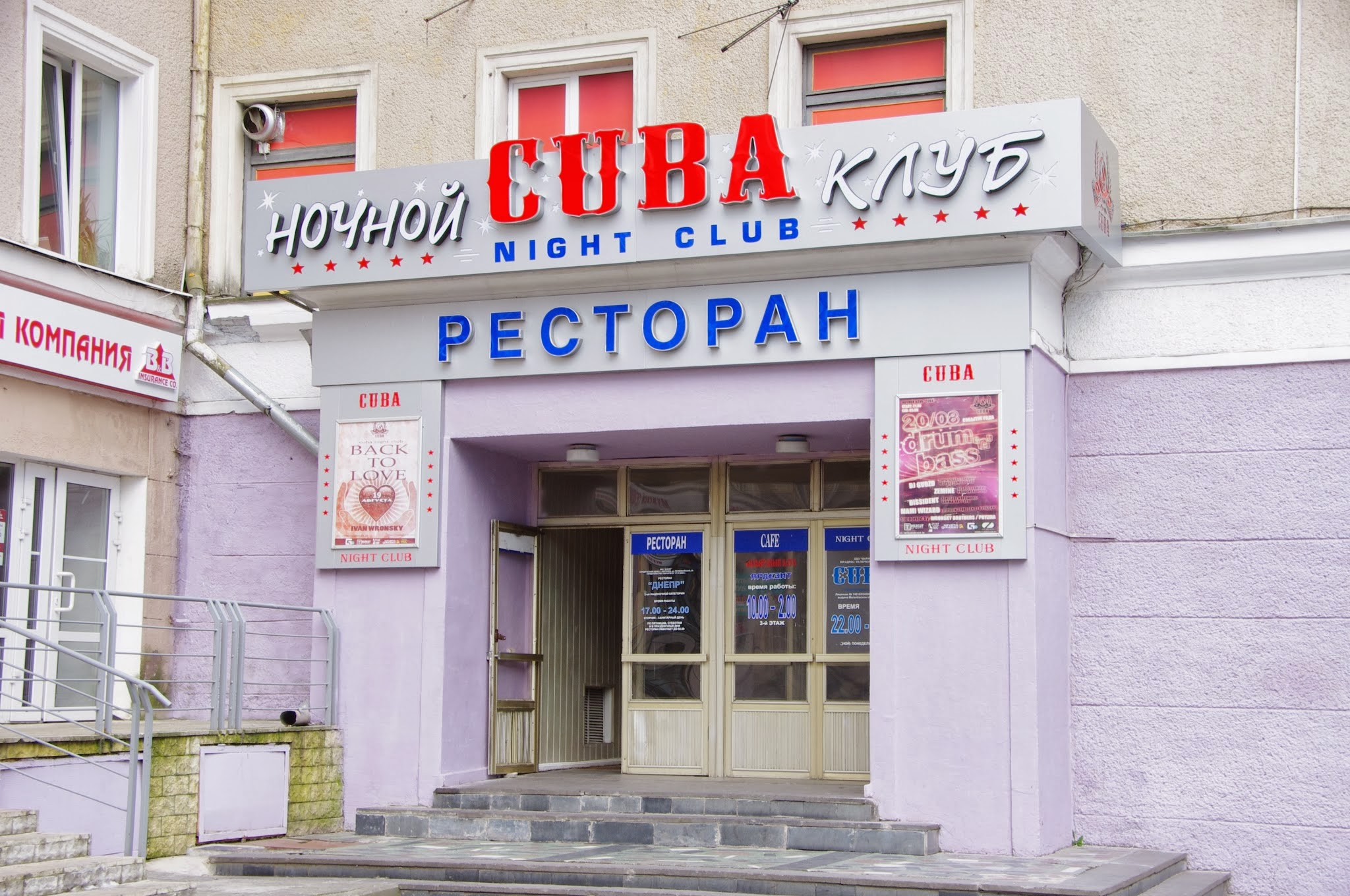 Lieninski District, Mogilev, Belarus